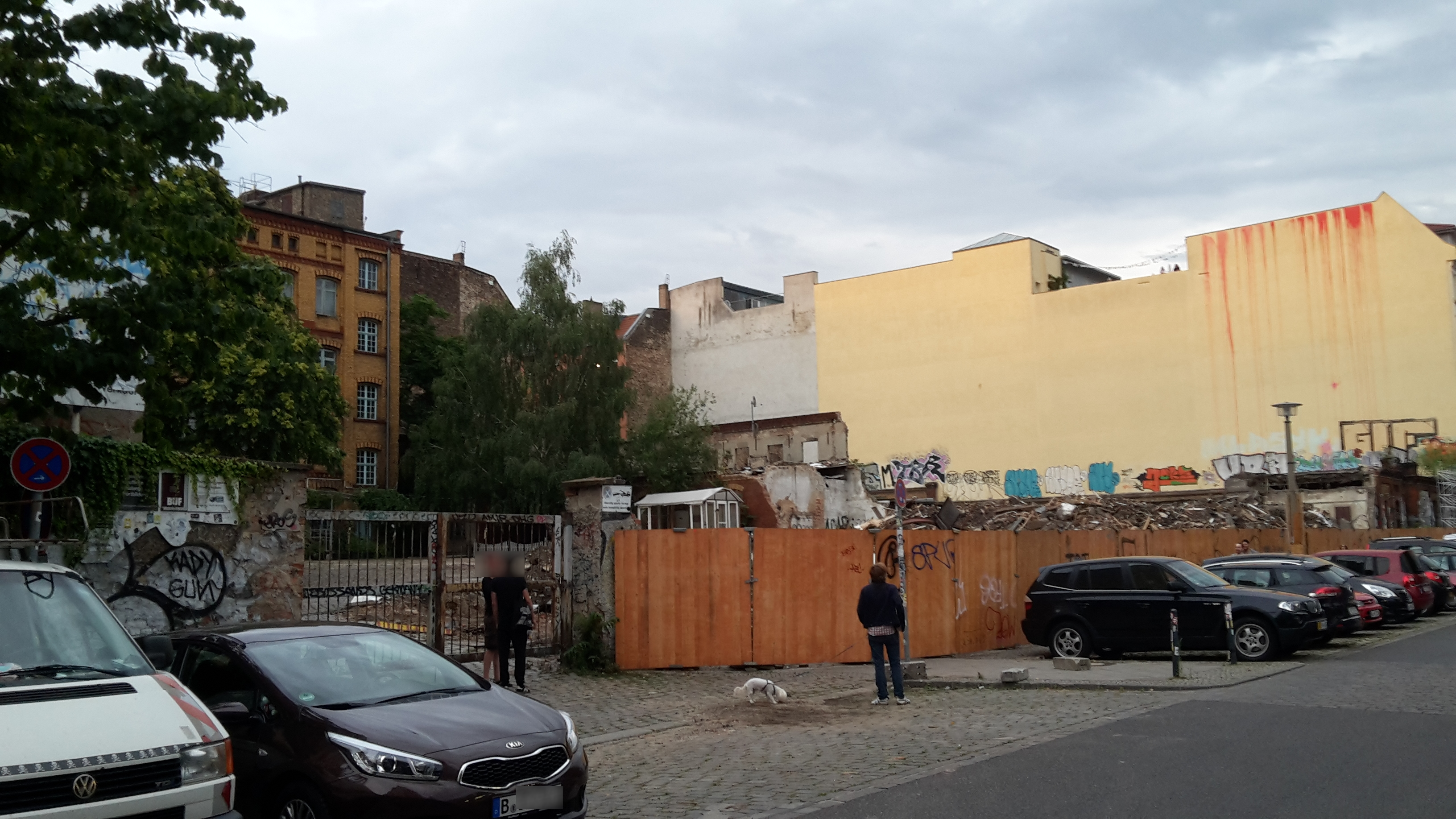 Rigaer Straße 70-73, das Grundstück, auf dem ehemals die Eckertschen Arbeiterwohnhäuser standen, nach dem Abriss jener im Juli 2016 (Aufnahmedatum: 13.07.2016)